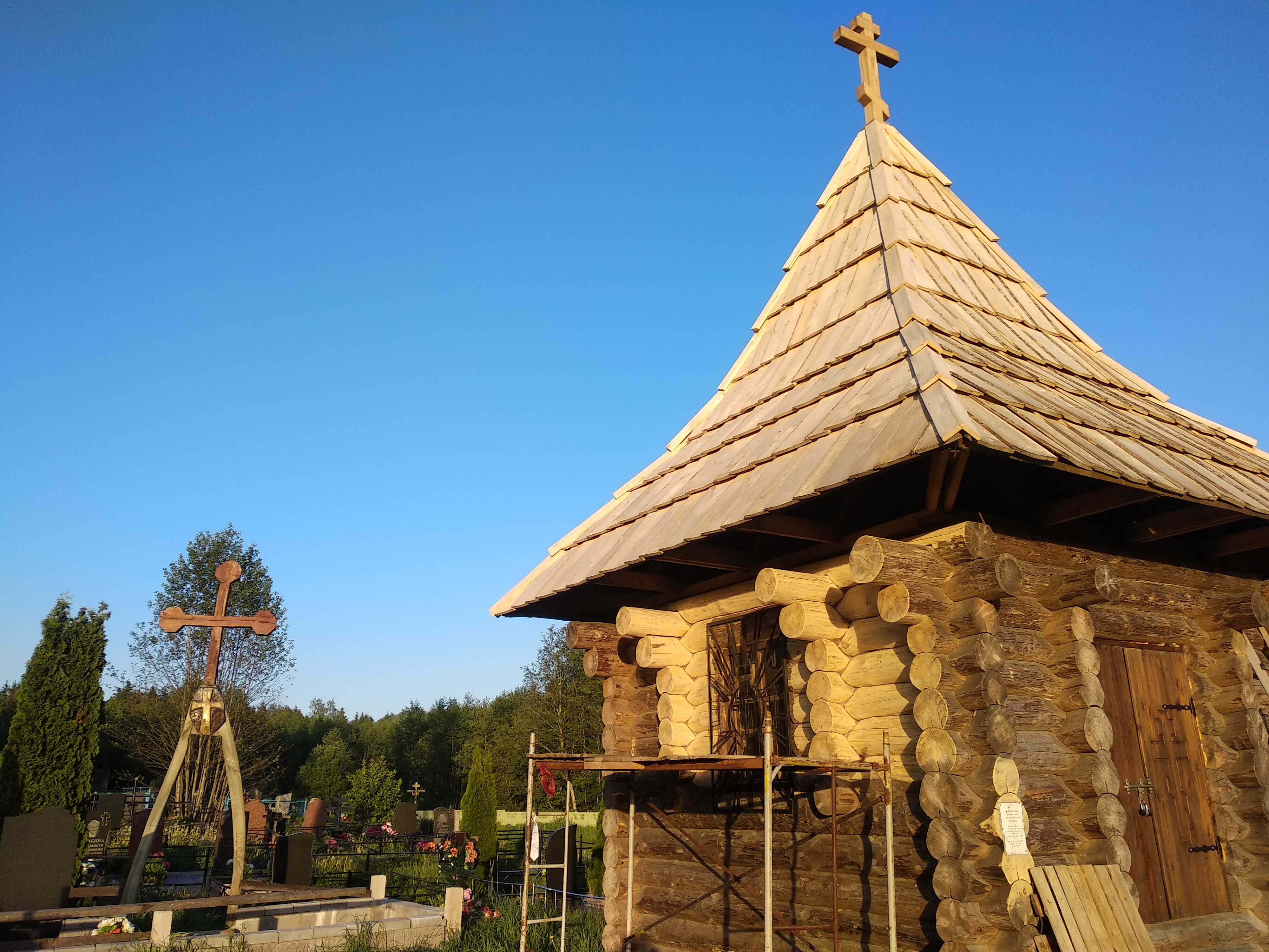 Zukauka, Minsk region